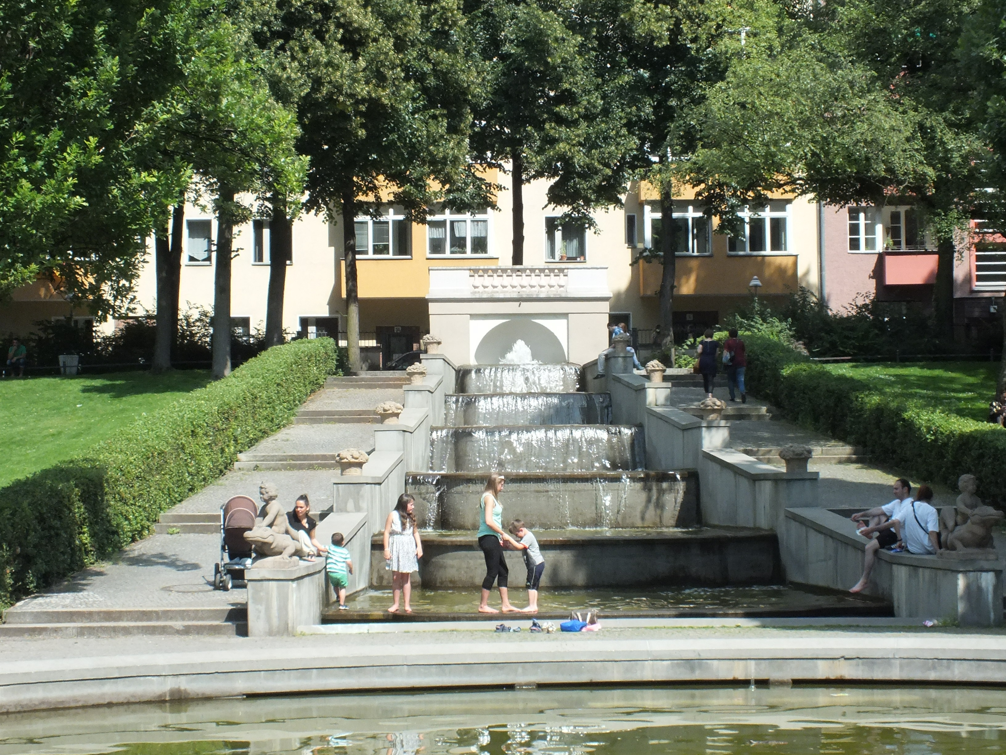 Der Körnerpark in Berlin NeuköllnThis is a photograph of an architectural monument.